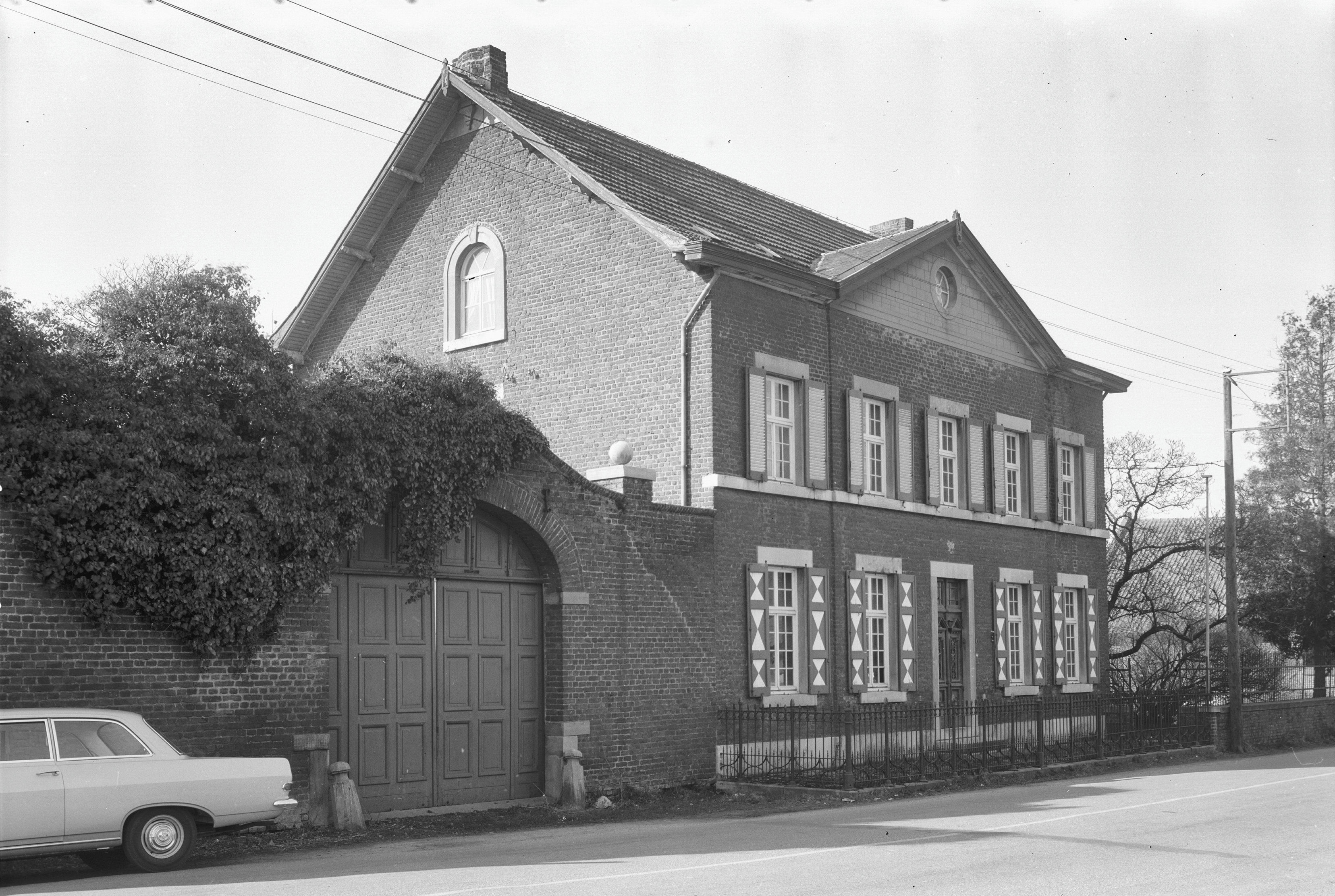 aanzicht